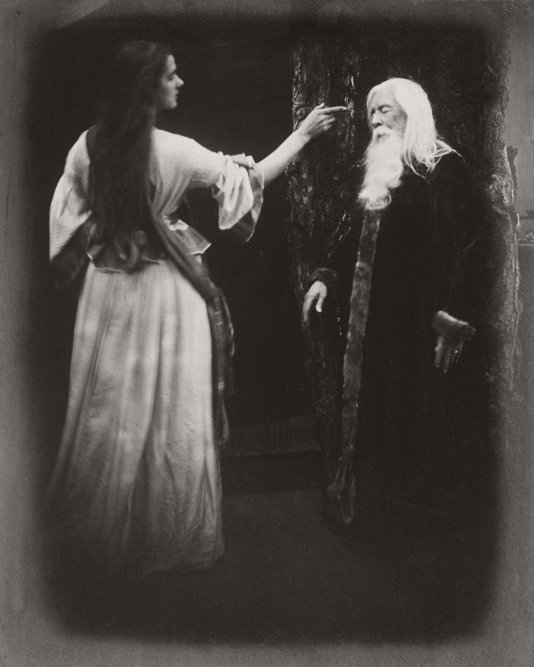 Vivien and Merlin (1874) albumen print 33.0 x 26.6 cm.